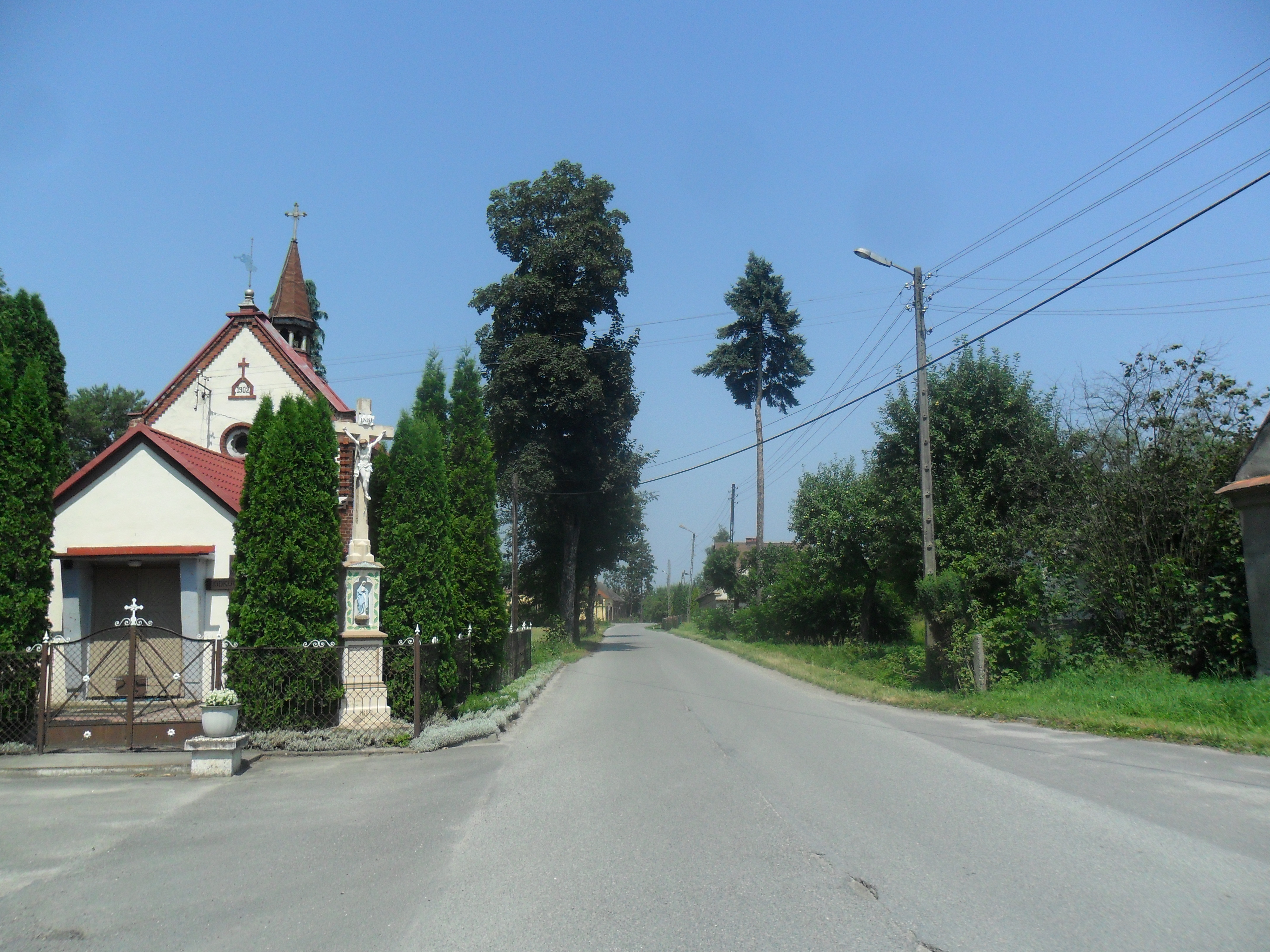 Główna droga w Ligocie Tworkowskiej, po lewej kościół